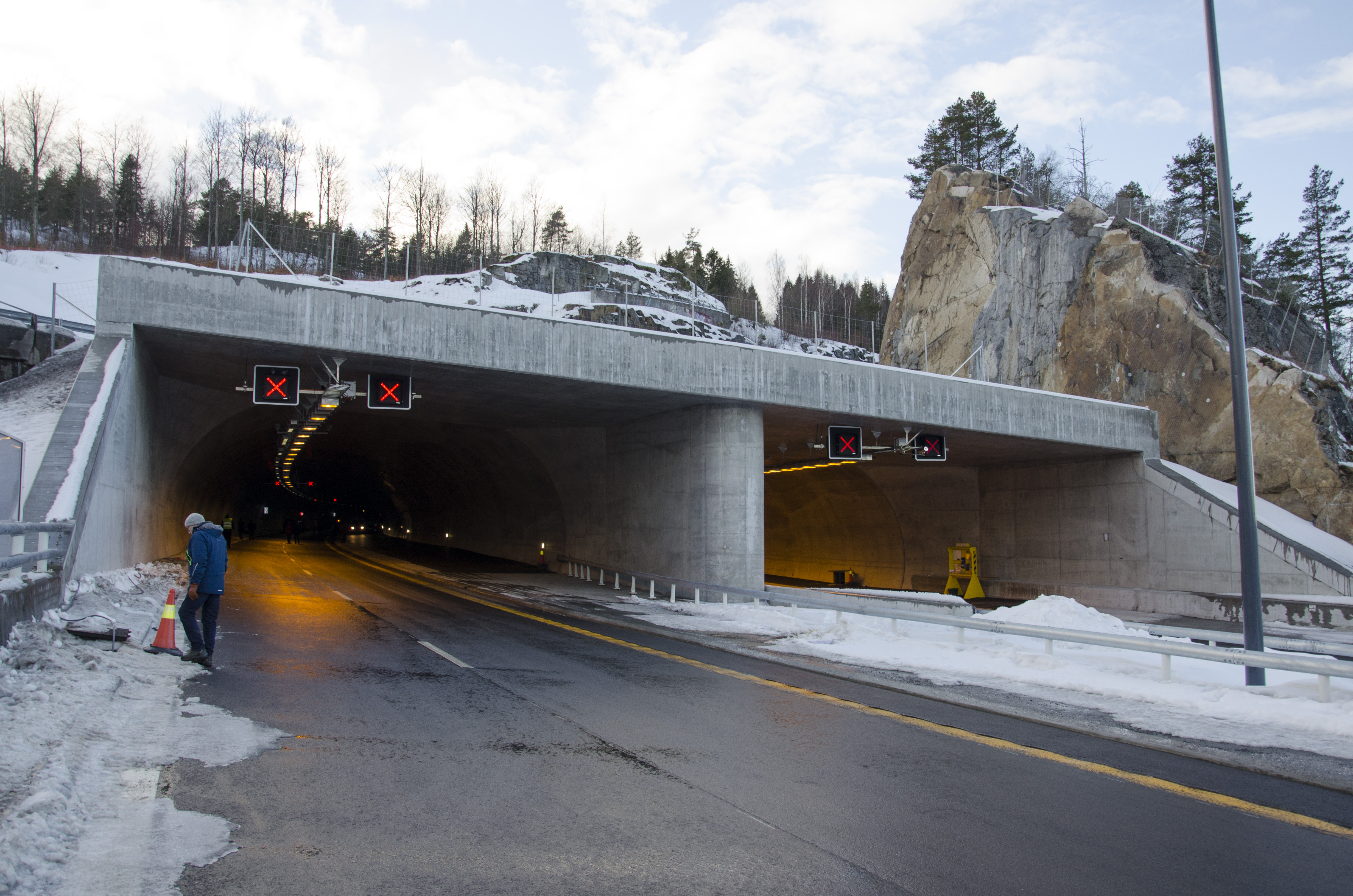 Martineåstunnelen på E18 i Larvik